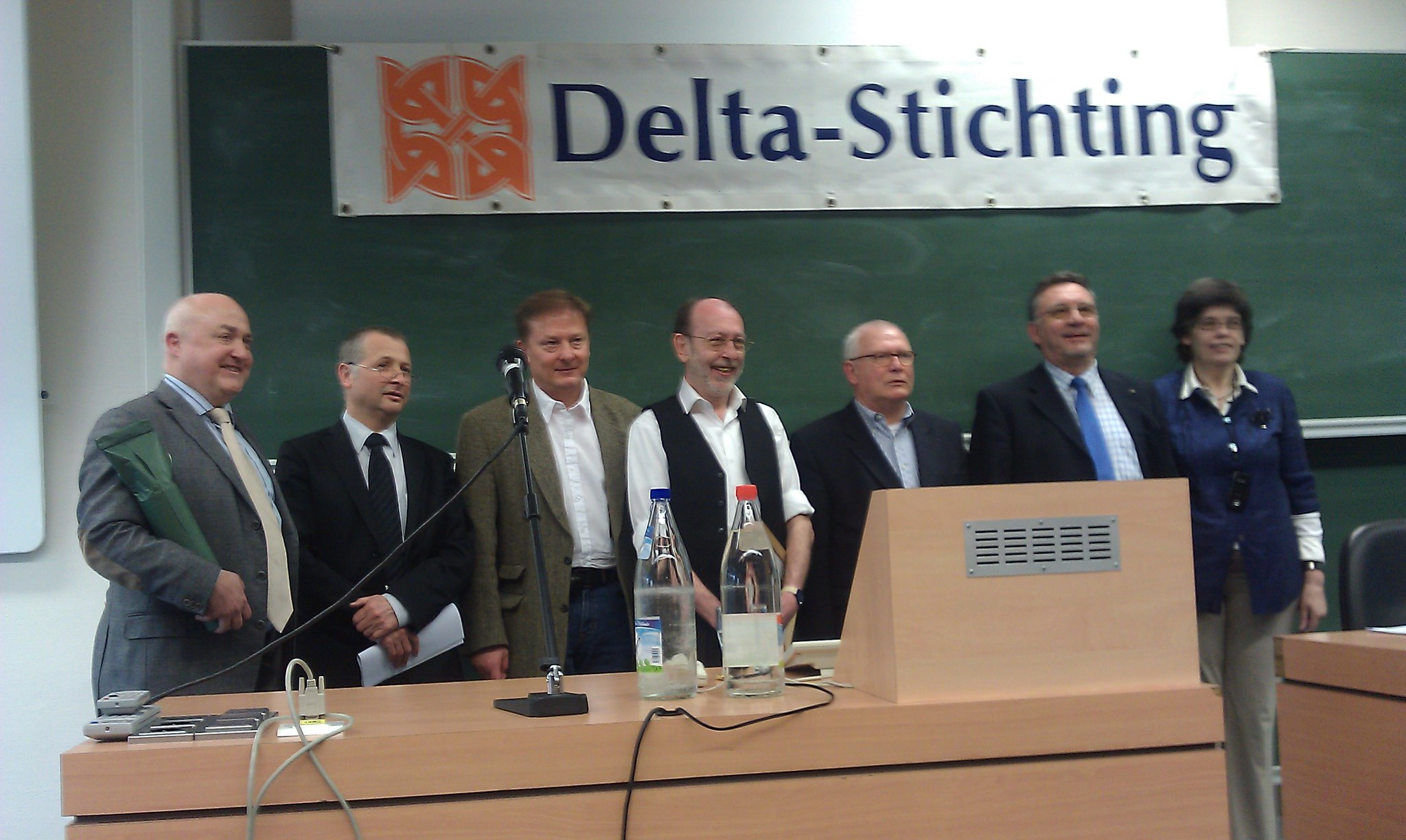 Alain de Benoist met Henry Nitzsche en ander gaste by die 'Colloquium van de Delta-Stichting' in Antwerpen.